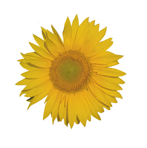 Solrosen är Sorundanet Nynäshamns kommunparti symbol